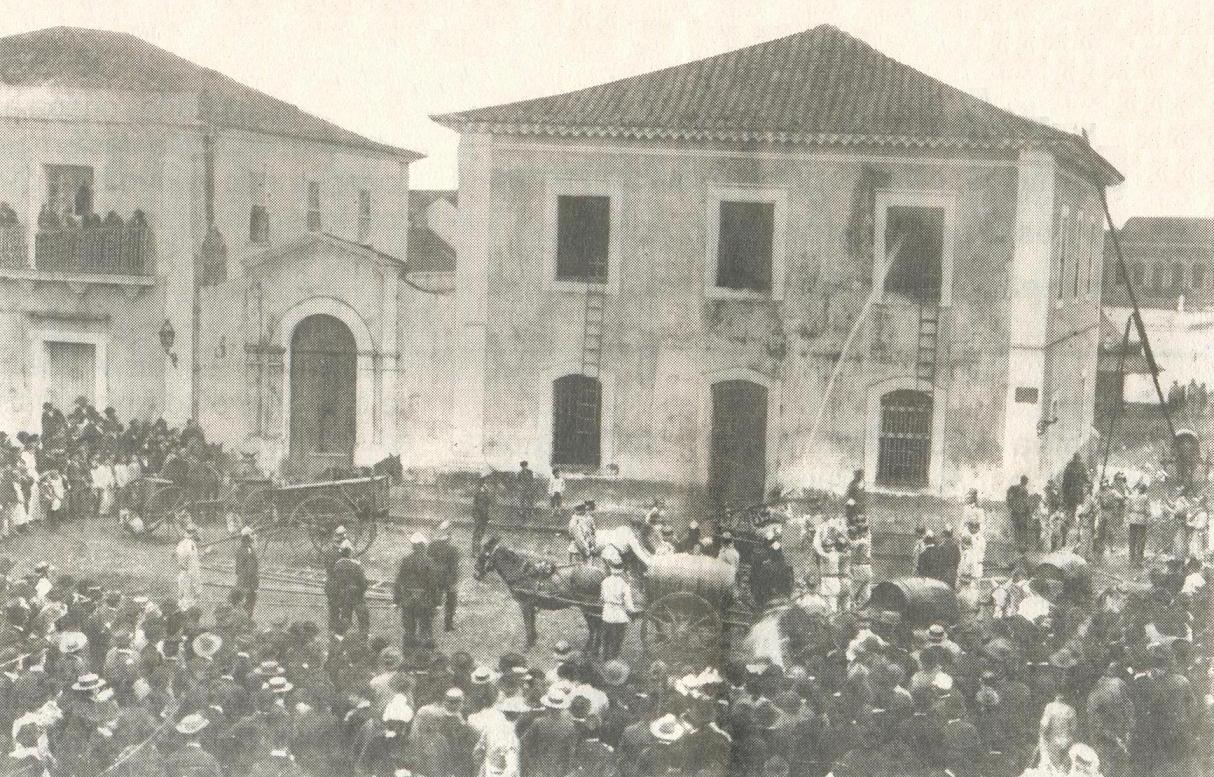 Bombeiros combatendo um incêndio na Cadeia Pública de Curitiba - 1897.